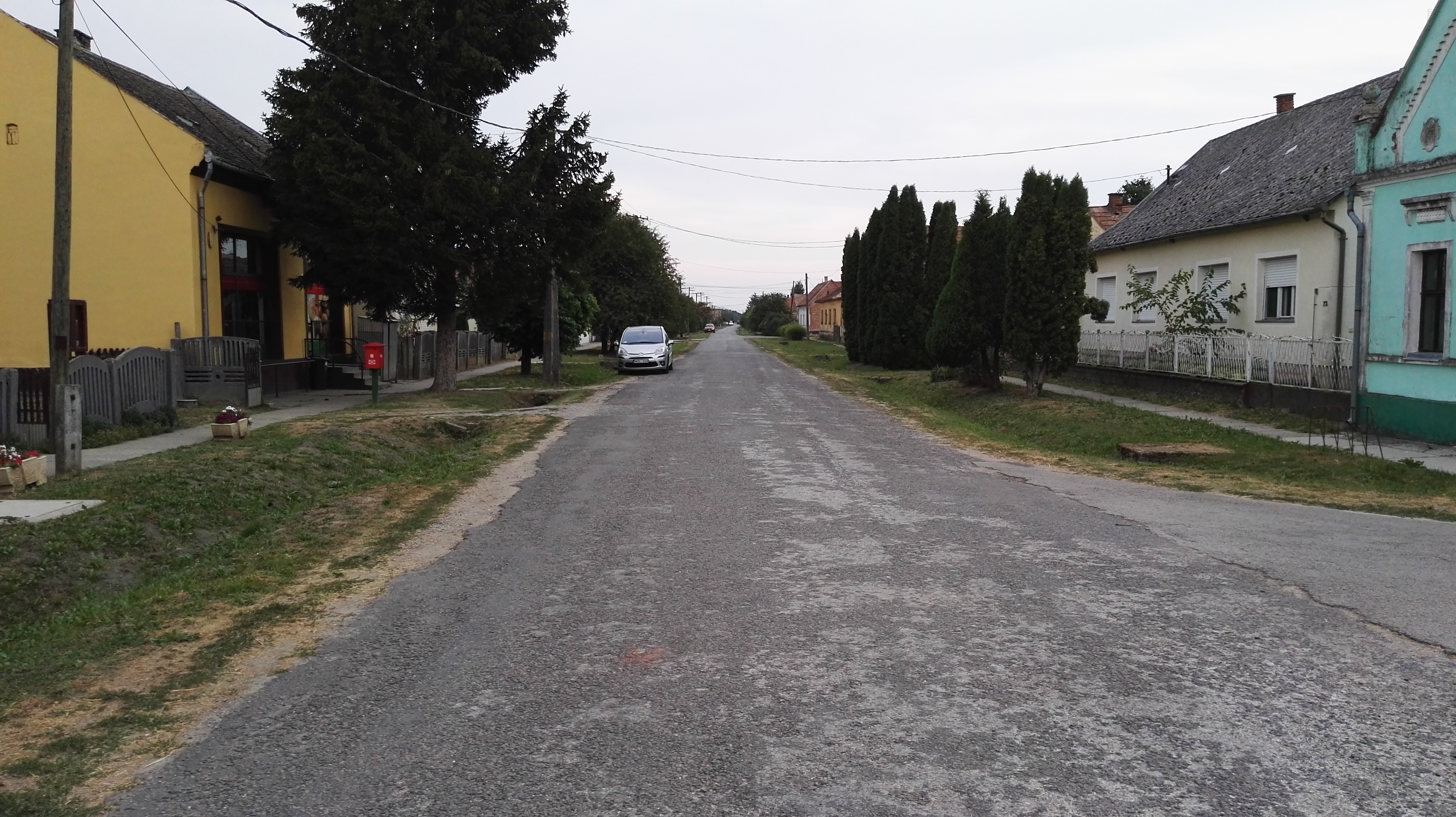 Српски (ћирилица): Tótújfalu Szabadság utca